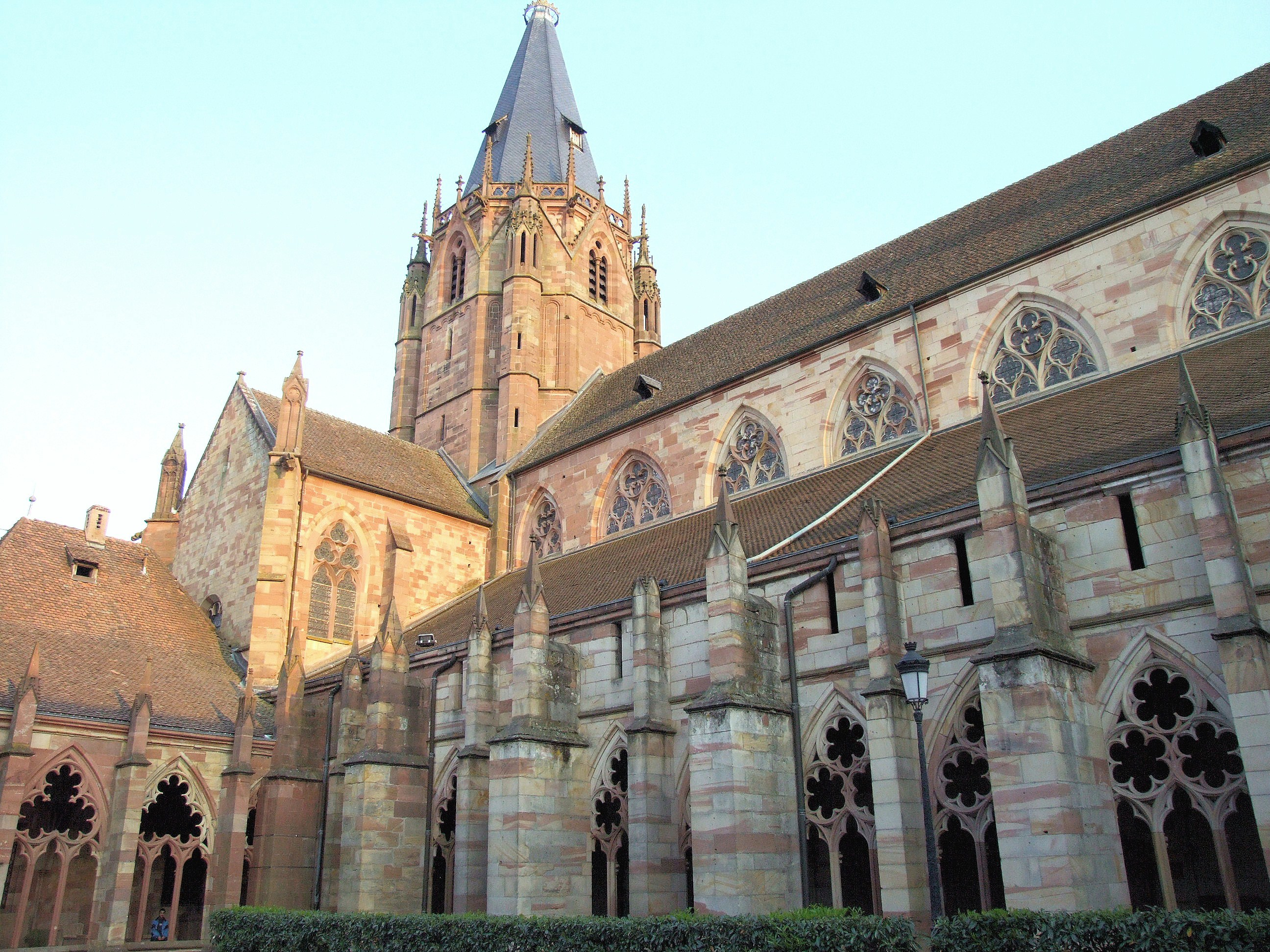 Wissembourg - Eglise Saint-Pierre-et-Saint-Paul - Façade Nord et galeries du cloître